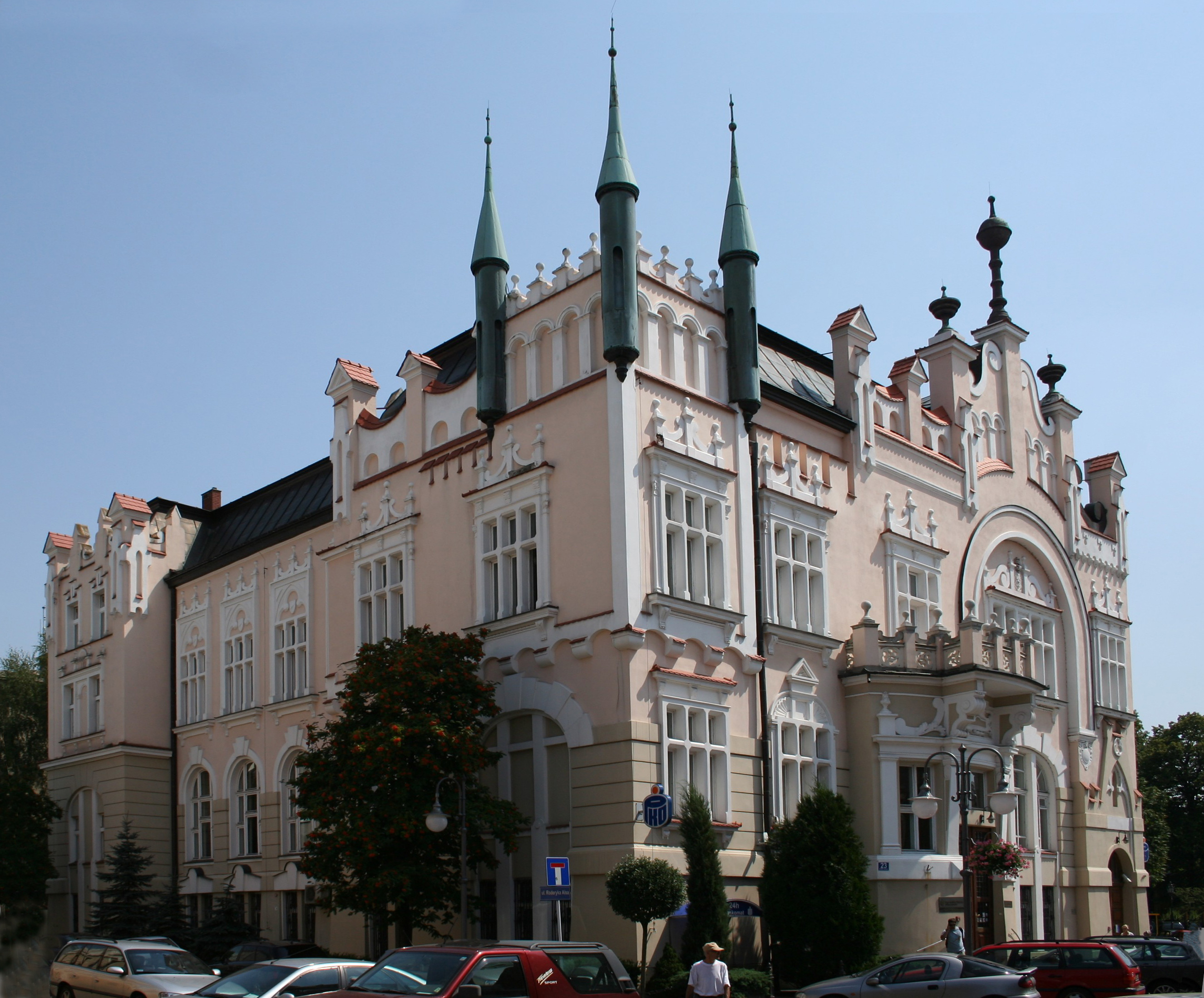 Rzeszów, ul. 3 Maja 23 - dawna Kasa Oszczędnościowa, obecnie bank PKO BP